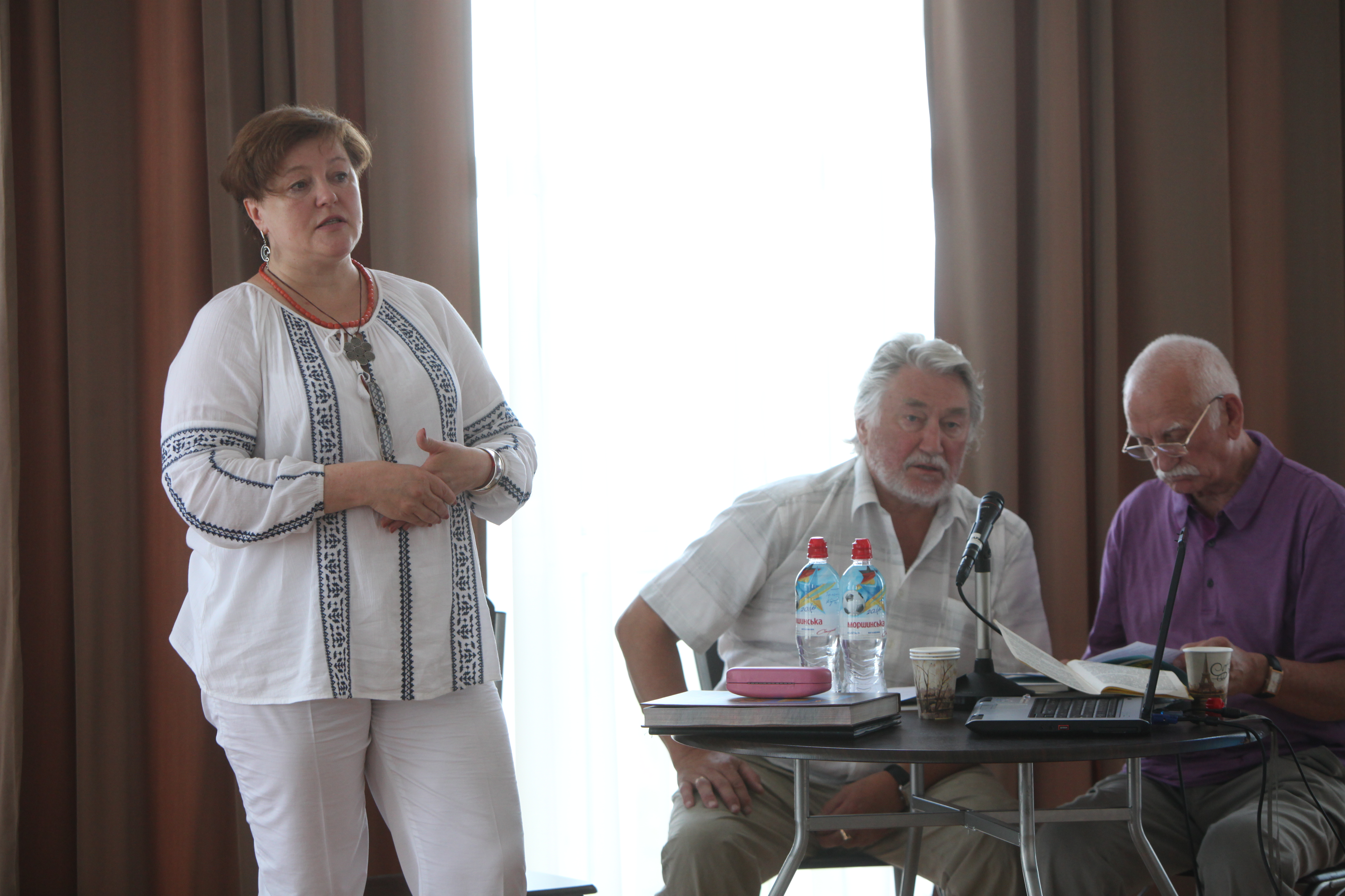 Тетяна Сосновська виступає на конференції «Повернення культурних цінностей в Україну – державна справа». Національний музей історії України.